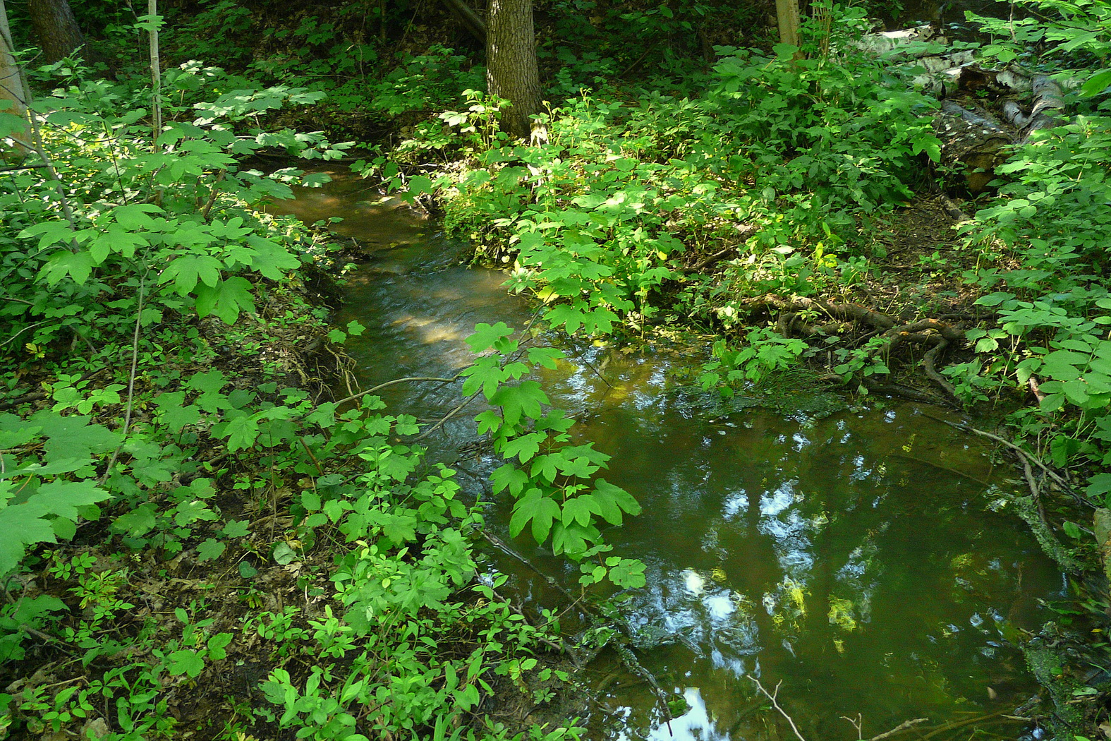 Žerčický potok před Žerčicemi